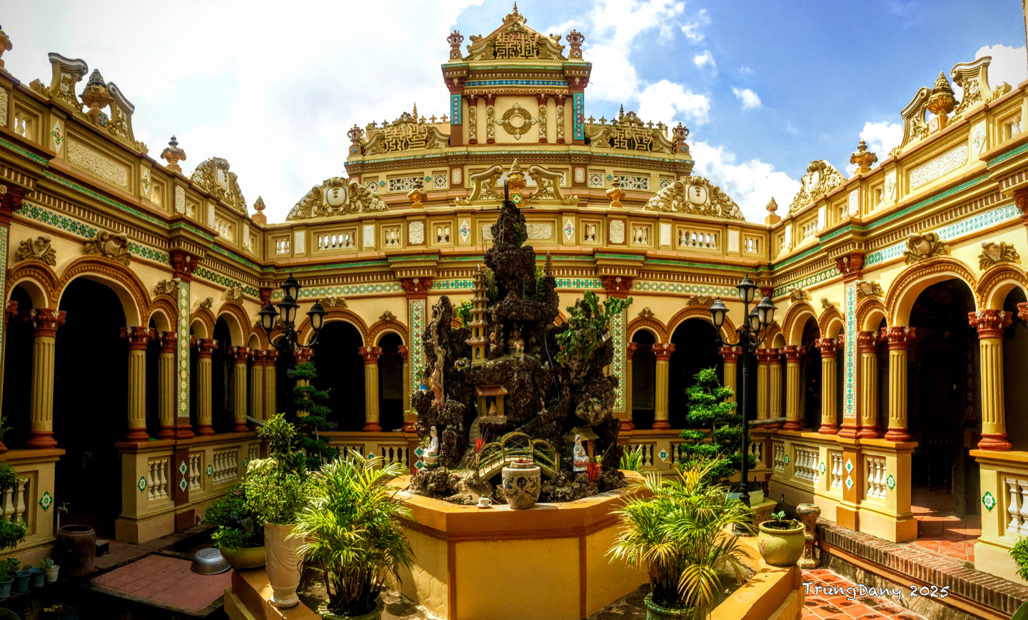 ChuaVinh trang, tp. Mytho ,Tien giang Vn